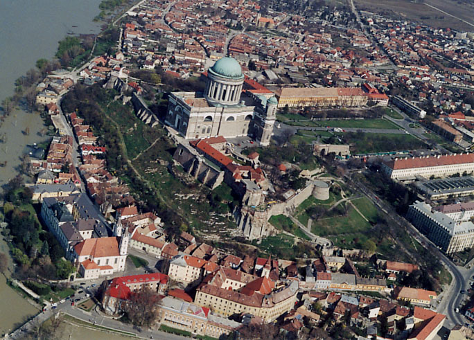 Esztergom - Komárom-Esztergom megye - Hungary - Europe